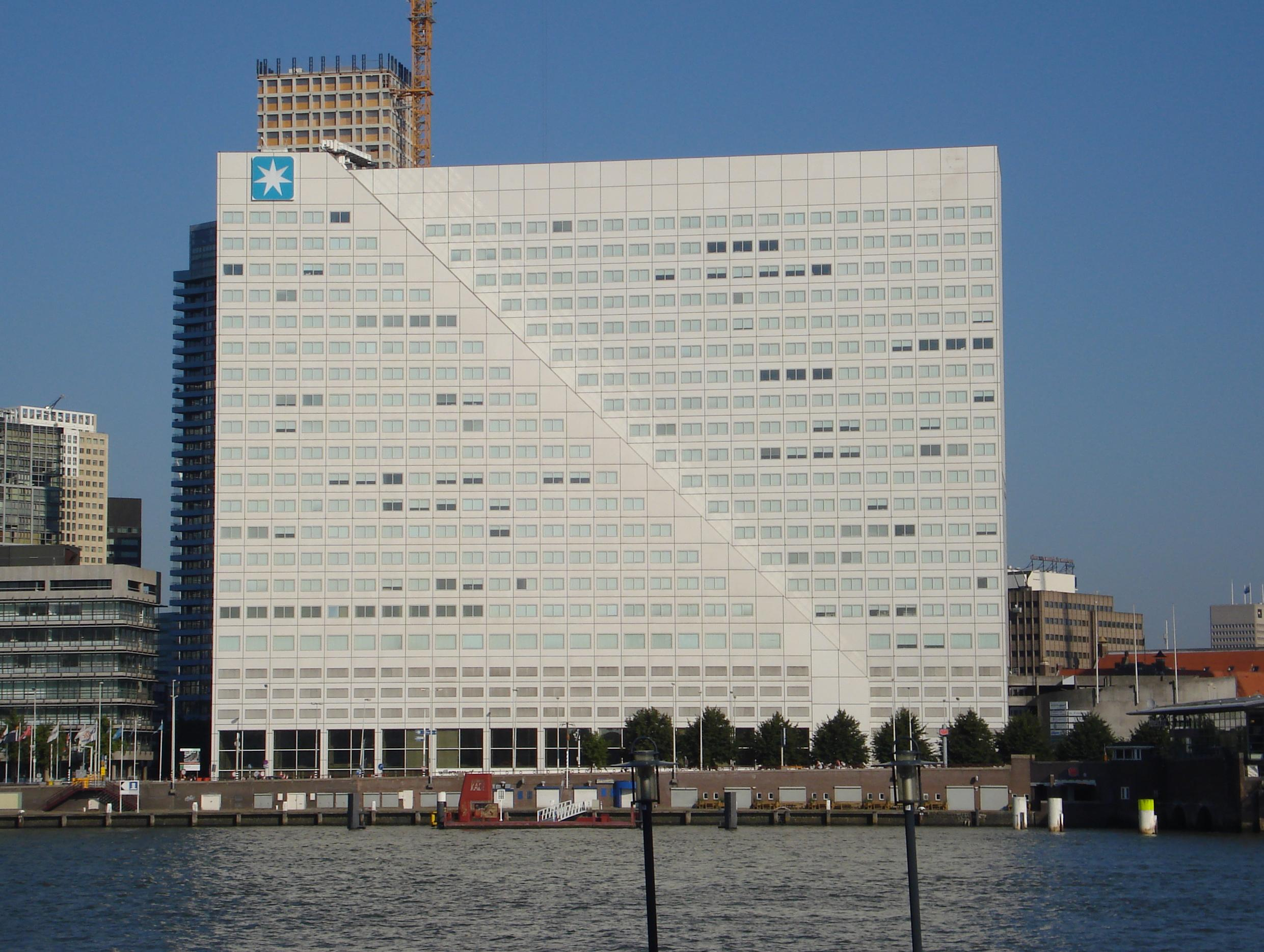 Rotterdam, Maasboulevard. Nedloyd gebouw "Willemswerf".